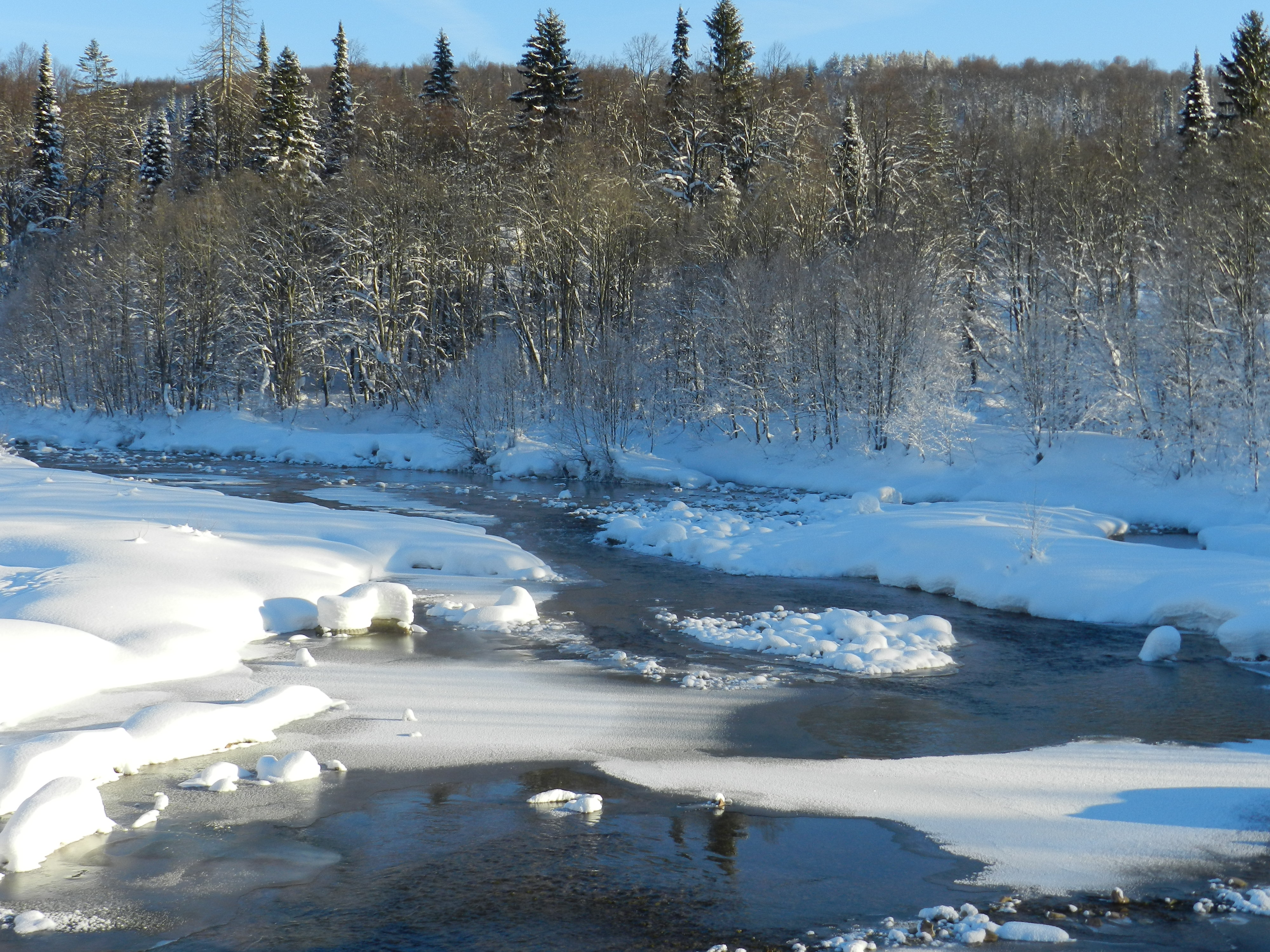 Реки Яман-Елга, Сарва и их окрестности: Нуримановский район, Башкортостан This image is related to the protected area of Russia number 0210192